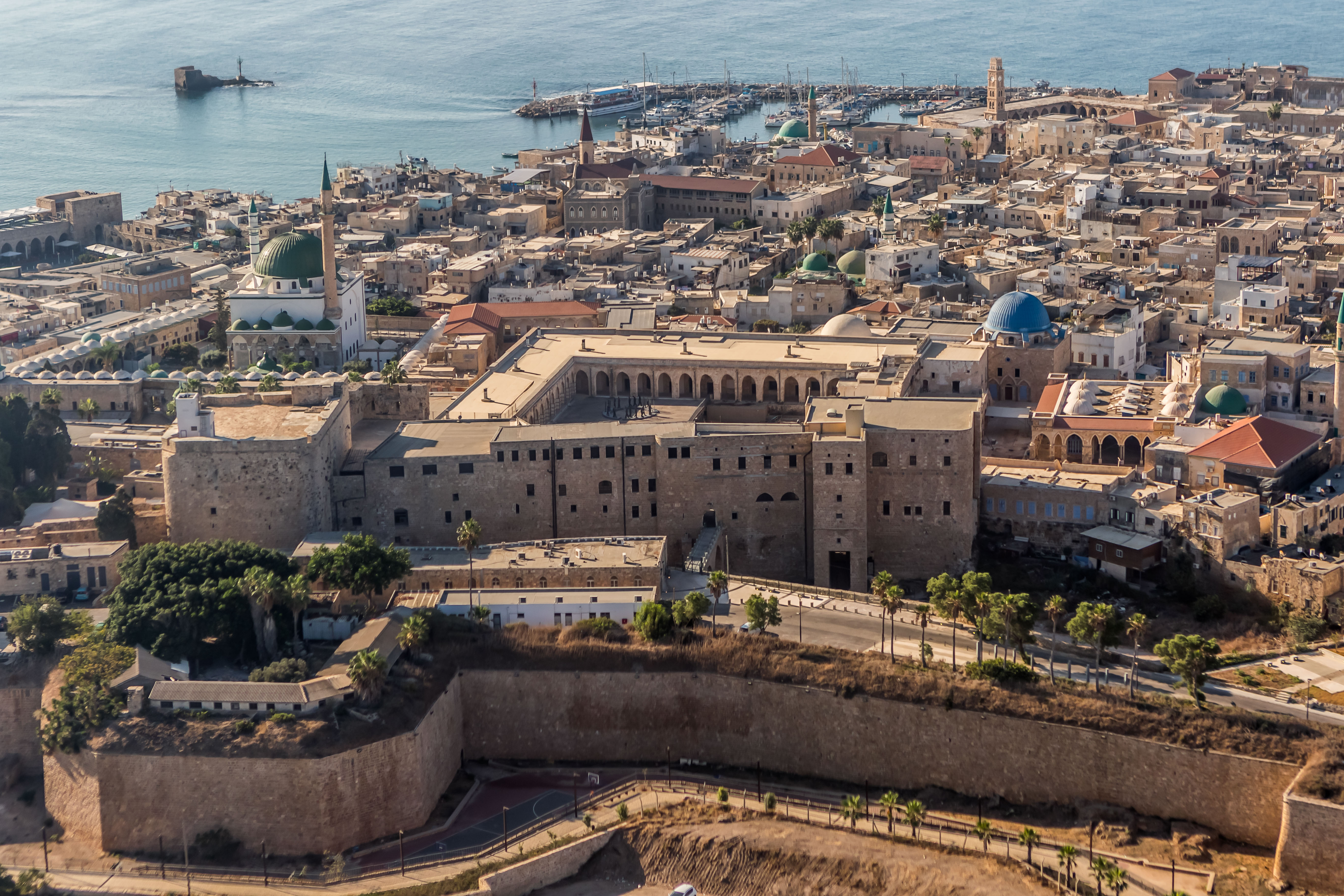 המצודה בעכו נבנתה בימי הטורקים על בסיסה של המצודה ההוספיטלרית בצפונה של העיר העתיקה. המצודה הייתה חלק מן המבנה ההגנתי של עכו, וצידה הצפוני שולב בחומה הצפונית ובמגדל השמירה בורג' אל חזינה. המצודה בנויה סביב שתי חצרות מלבניות, אורכה ממזרח למערב הוא כ-170 מטר ורוחבה כמאה מטרים. במהלך המאה ה-20 שימשה המצודה כבית כלא, ובזמן המנדט הבריטי שימשה גם להוצאה להורג של עולי הגרדום. ב-4 במאי 1947 נערך אחד ממבצעי האצ"ל הנועזים, פריצת כלא עכו, שבמסגרתו פרצו חברי האצ"ל אל המצודה, ושחררו רבים מן הכלואים בה. לאחר קום המדינה שימש המקום כבית חולים פסיכיאטרי.